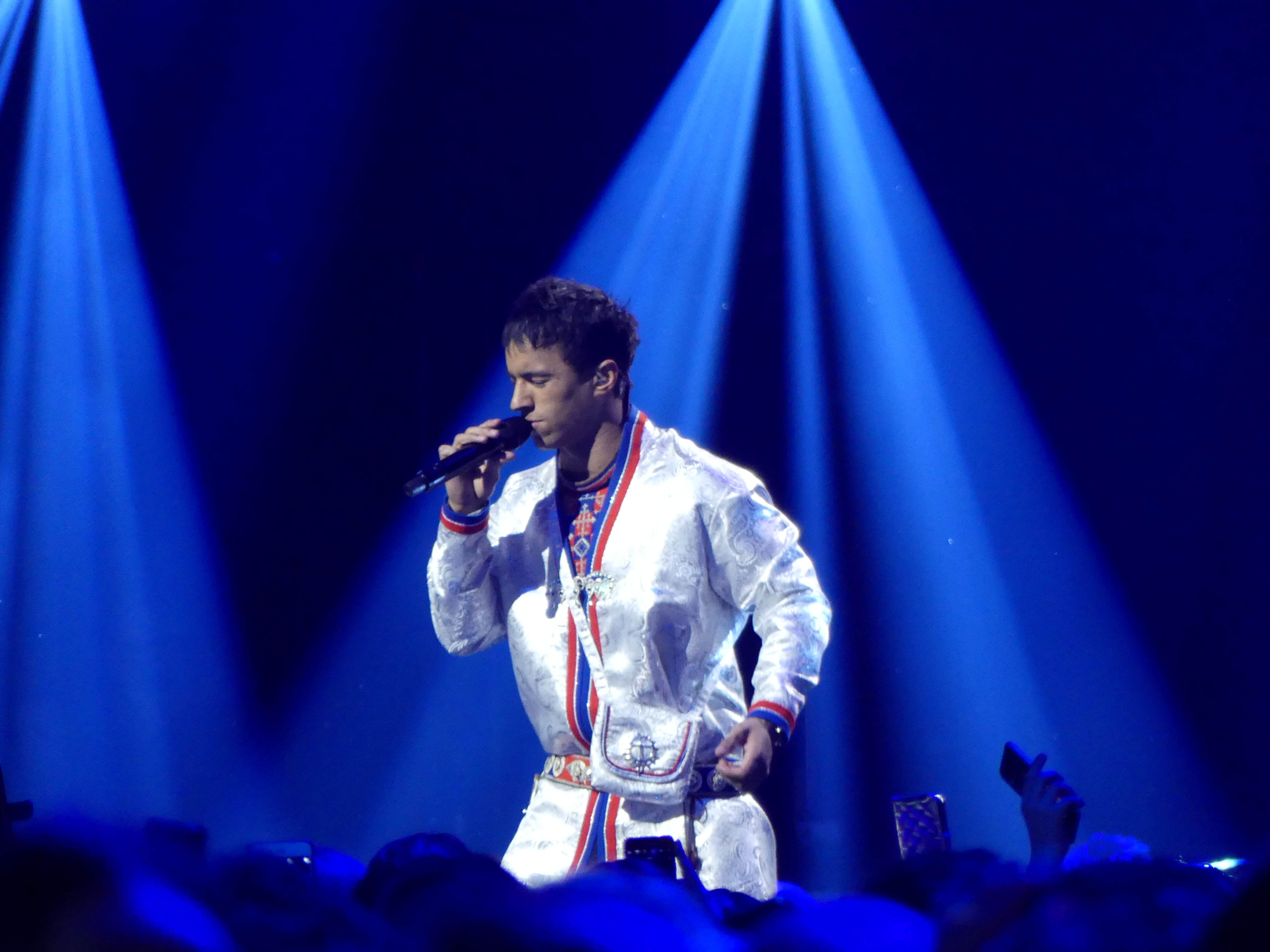 Melodifestivalen 2017, final Jon Henrik Fjällgren